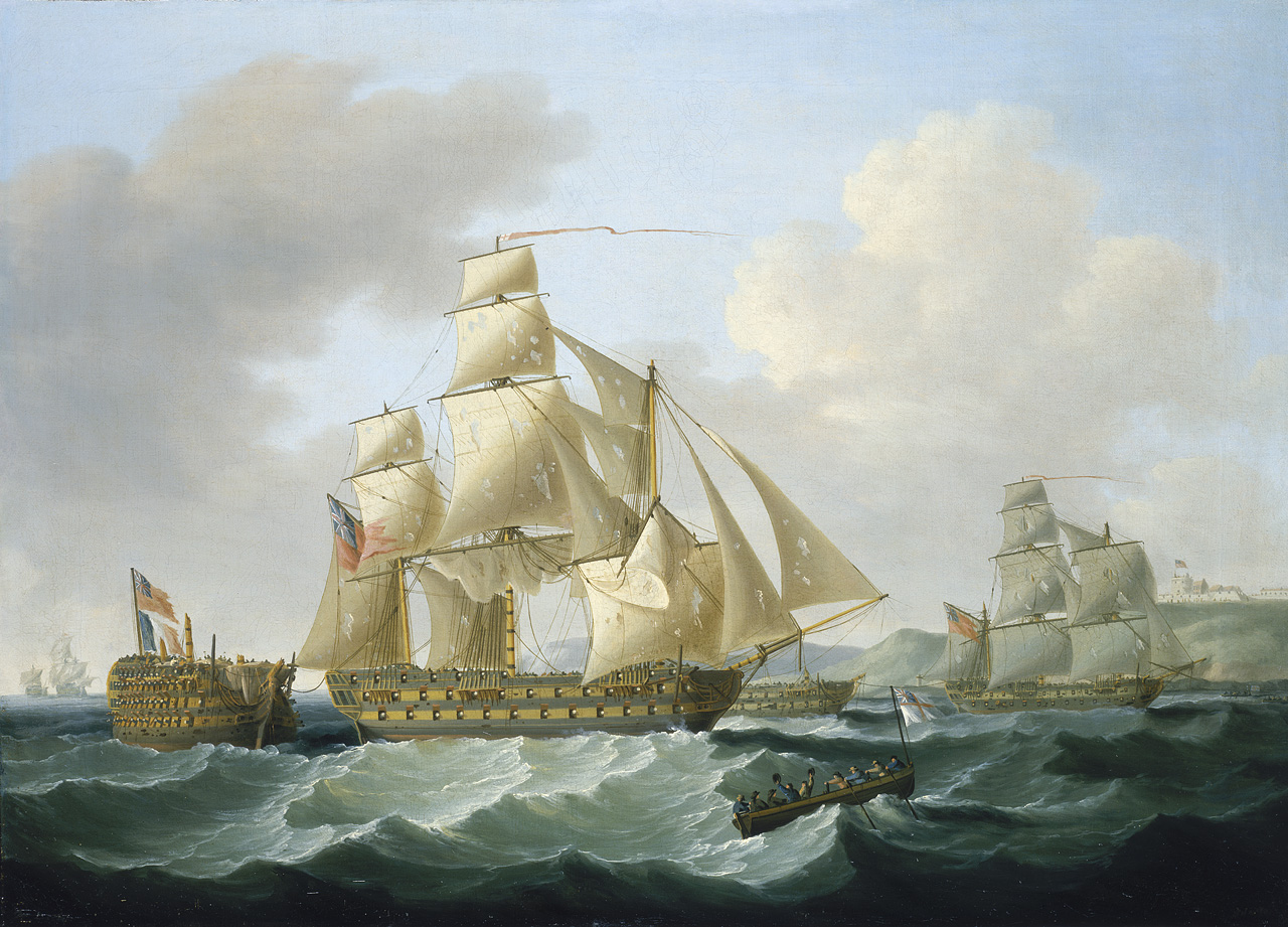 Ce tableau de Francis Sartorius, daté d'environ 1807, représente le retour en Angleterre de la division navale de commodore Strachan après la bataille du cap Ortégal. Le HMS Caesar, vaisseau de 80 canons, tire en remorque l'un des prises de la bataille, le vaisseau français Formidable.